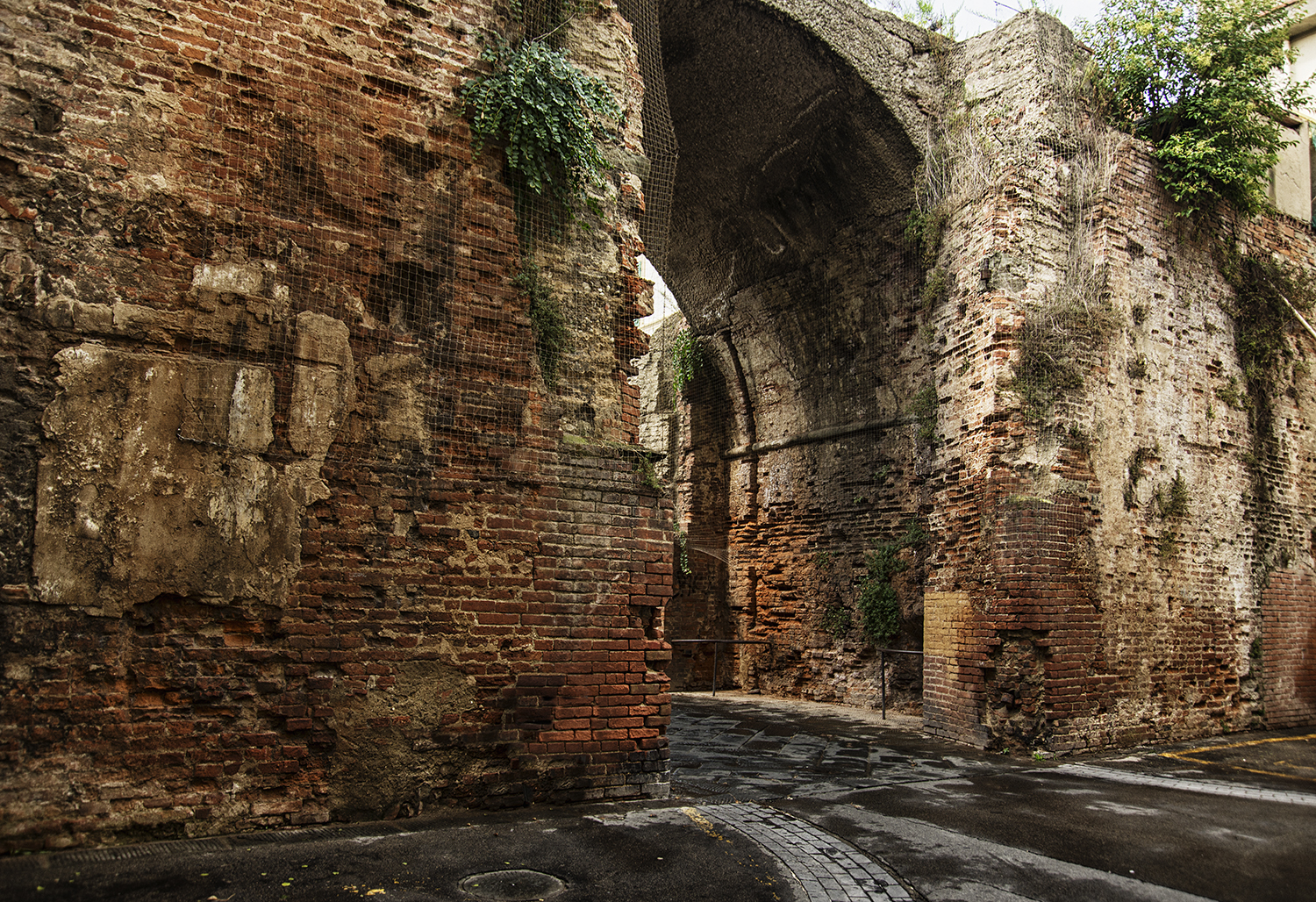 Porta Pisana This is a photo of a monument which is part of cultural heritage of Italy.